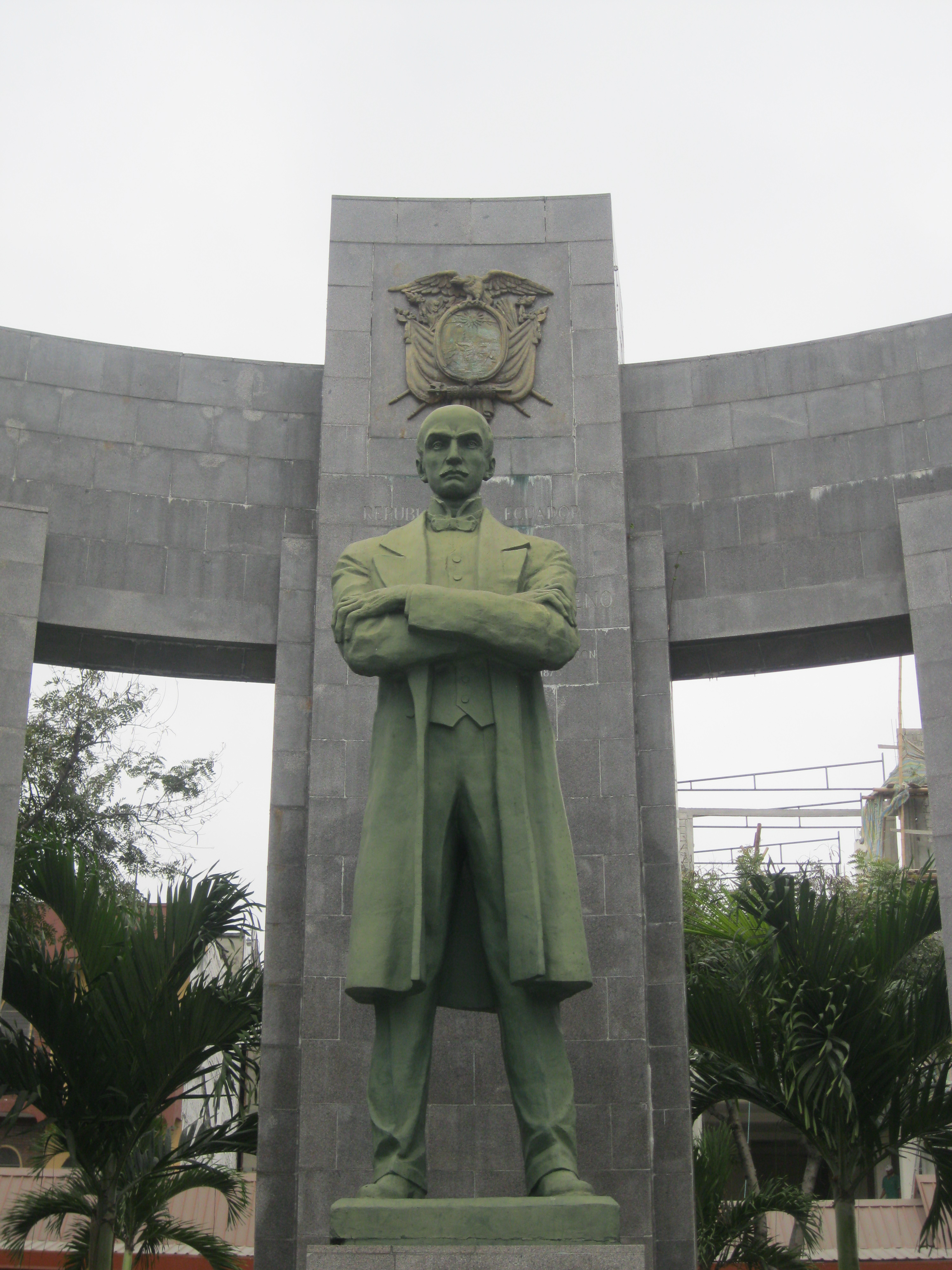 Monumento al ex presidente del Ecuador, García Moreno en La Plaza de La Victoria o Parque de La Victoria en el centro de Guayaquil